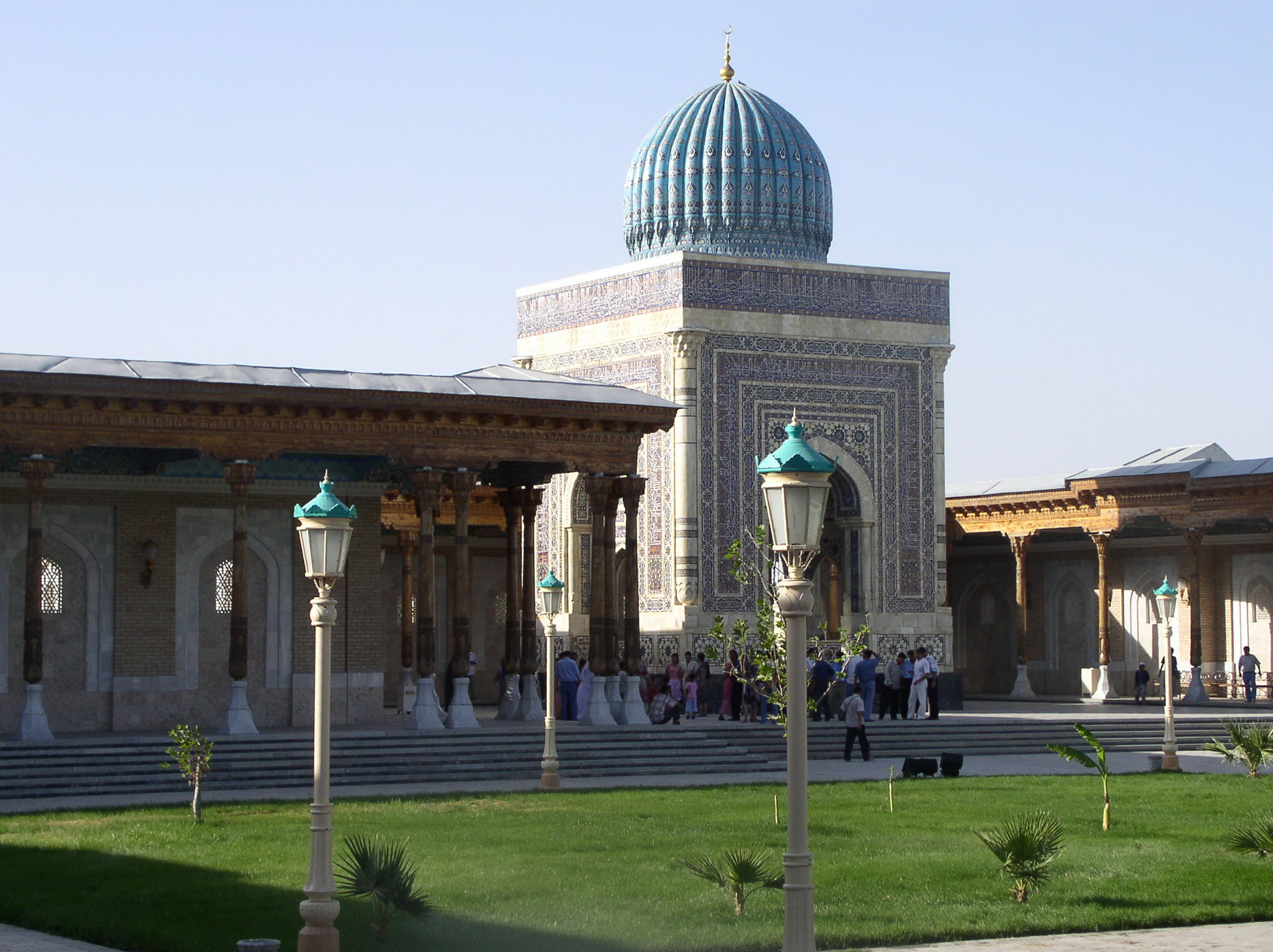 Mausoleum of Muhammad al-Bukhari. Samarkand viloyat, Uzbekistan